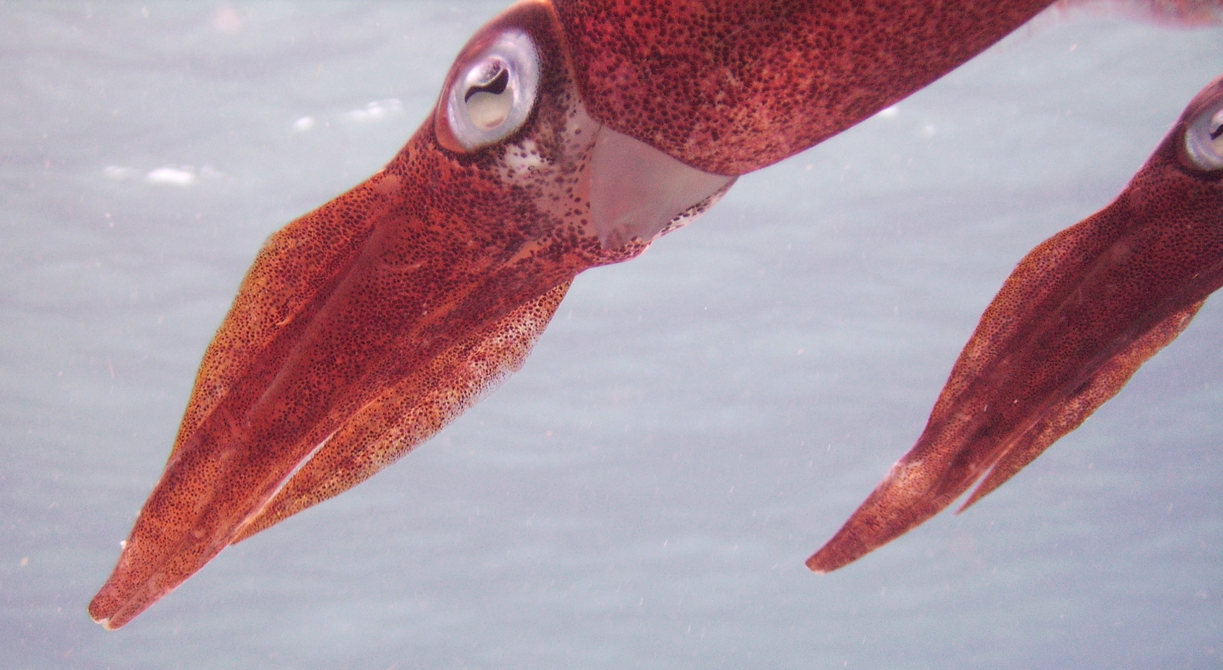 Karibische Riffkalmare